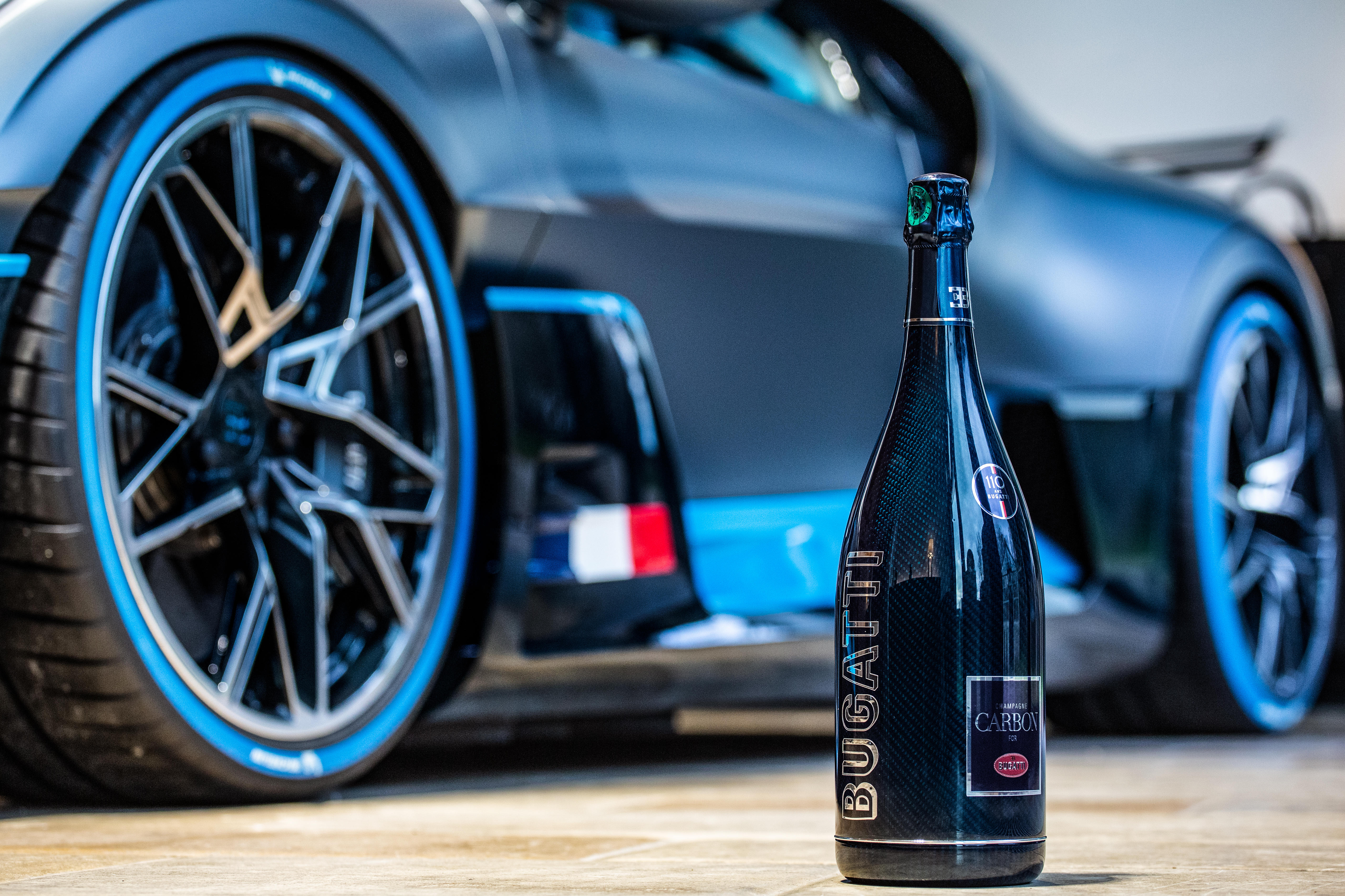 카본샴페인 부가티 에디션